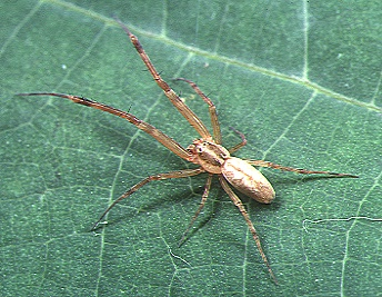 male Octonoba yaeyamensis from Okinawa.